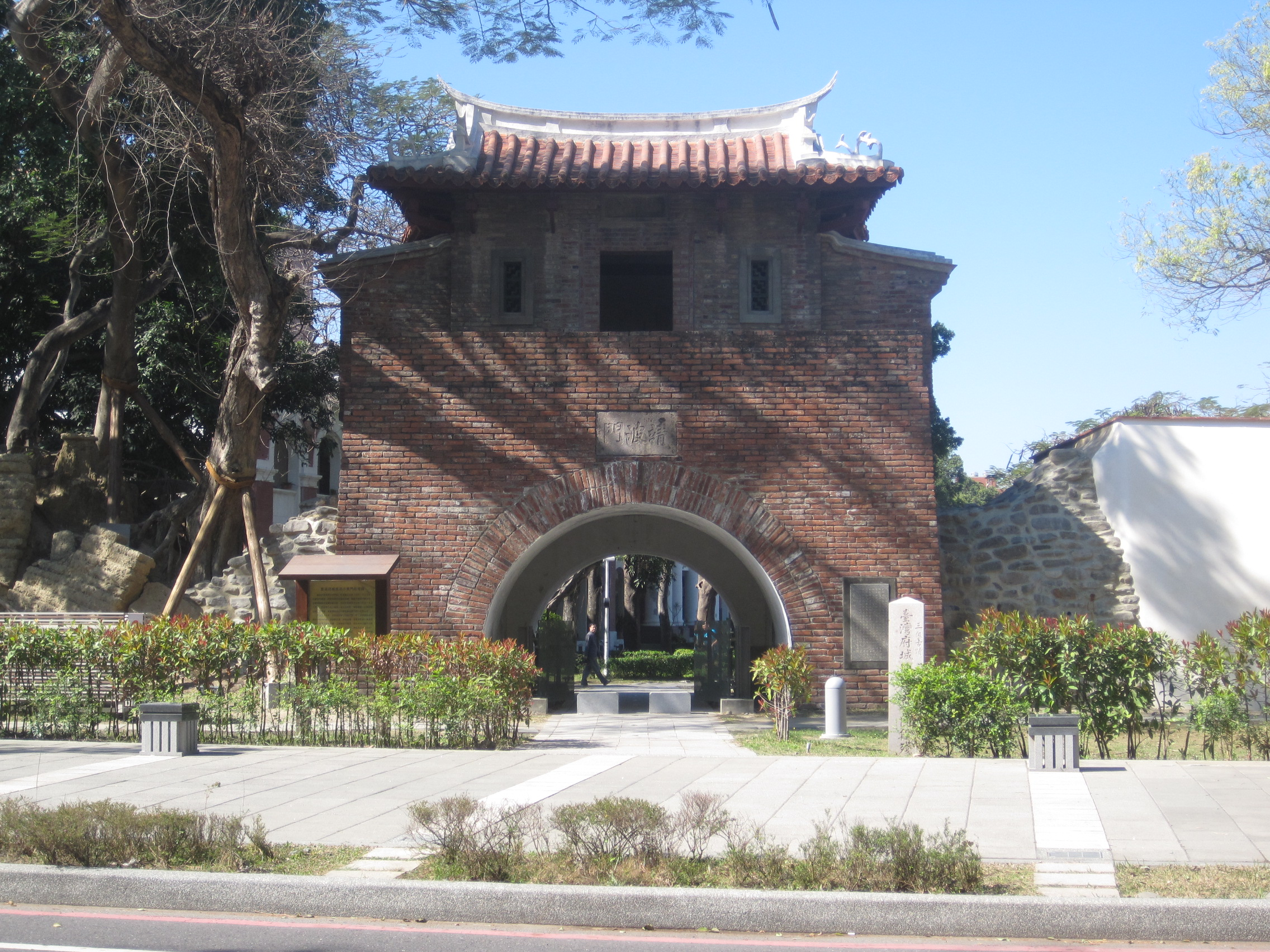 2014年拍攝的臺南小西門